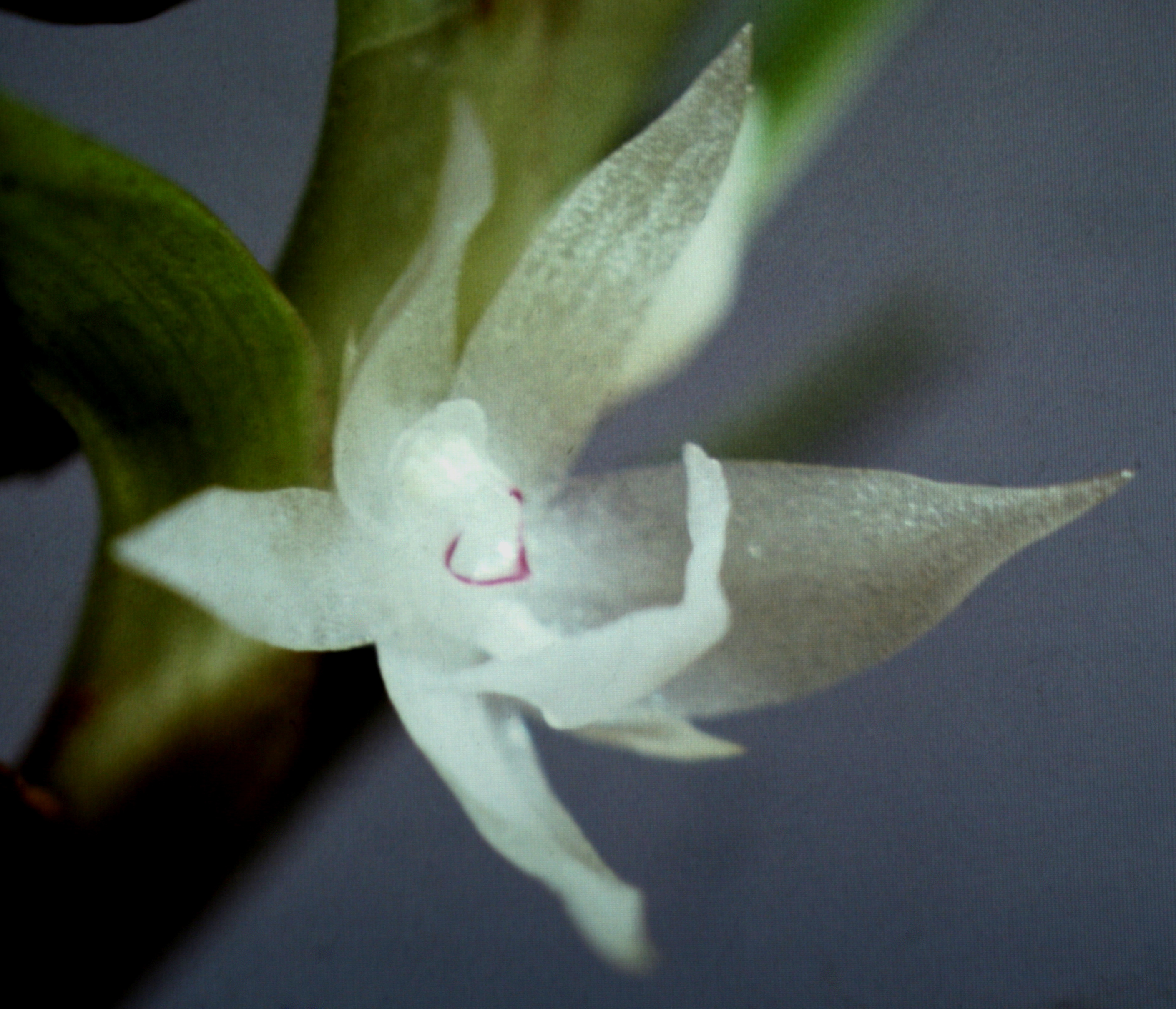 Dichaea picta. Suriname.